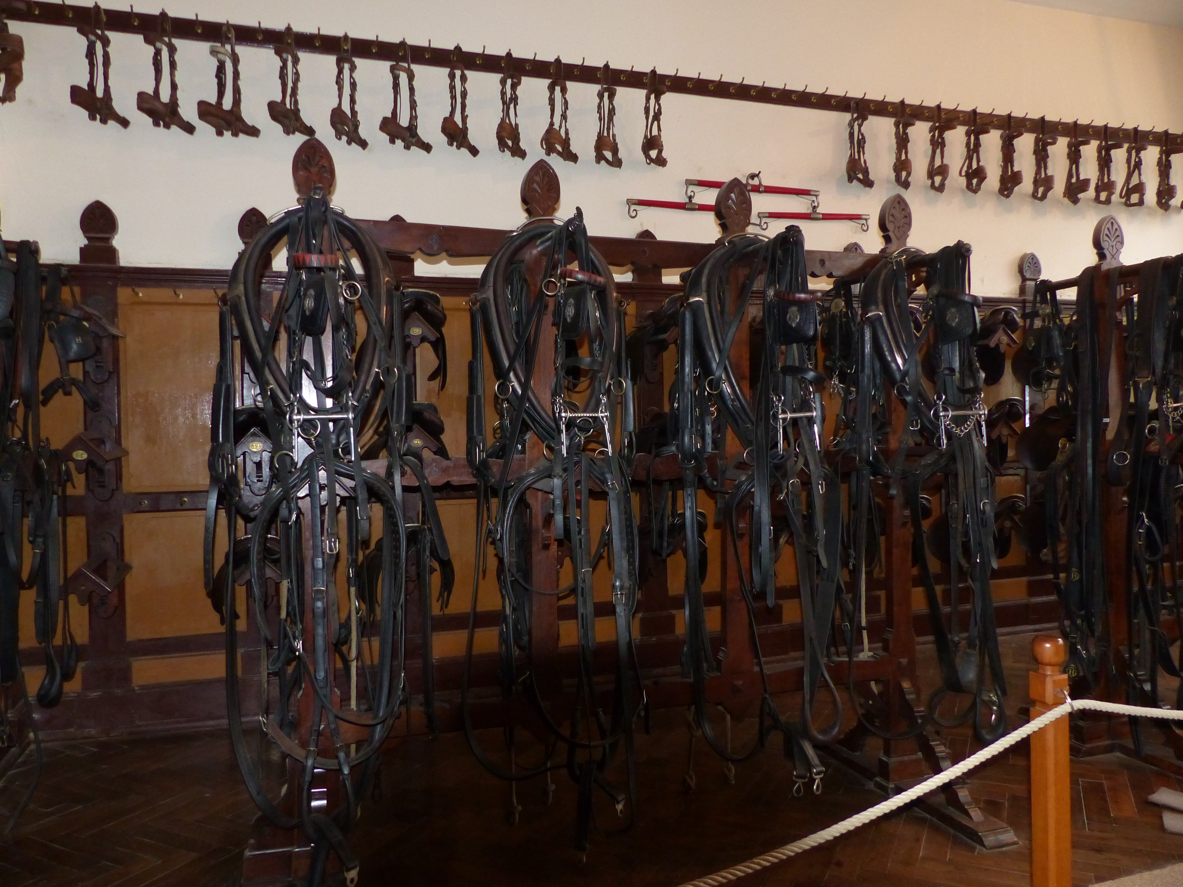 Sellerie du haras national de Lamballe; série de harnachements à l'anglaise (à collier).